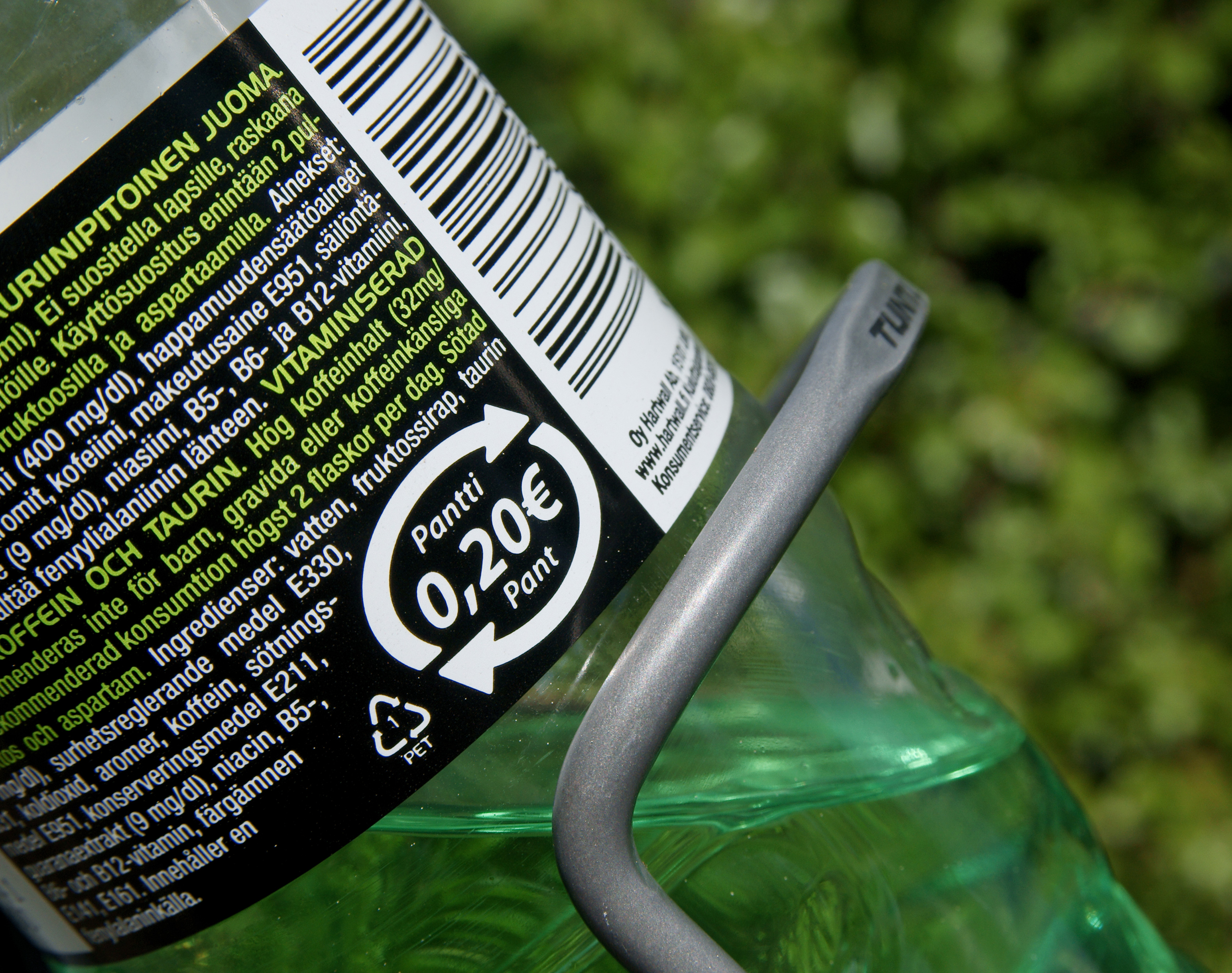 ED Green Light -muovipullo pyörätelineessä, pantti 20 senttiä.